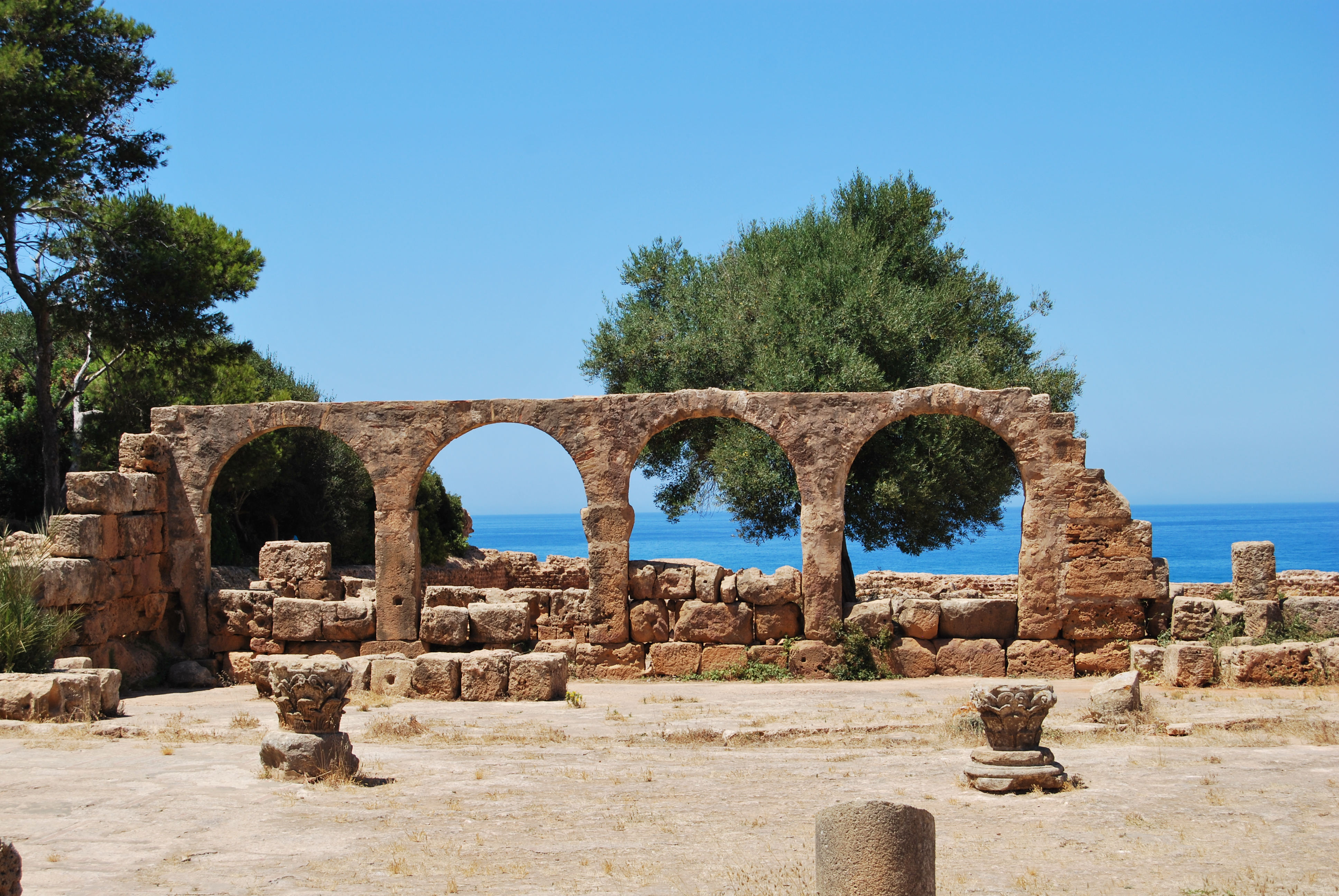 sites historiques tipaza